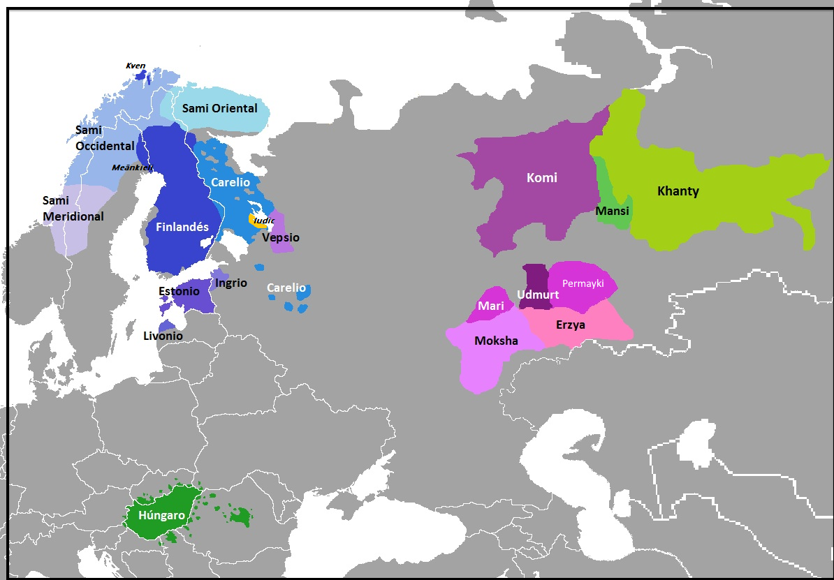 finno ugrics